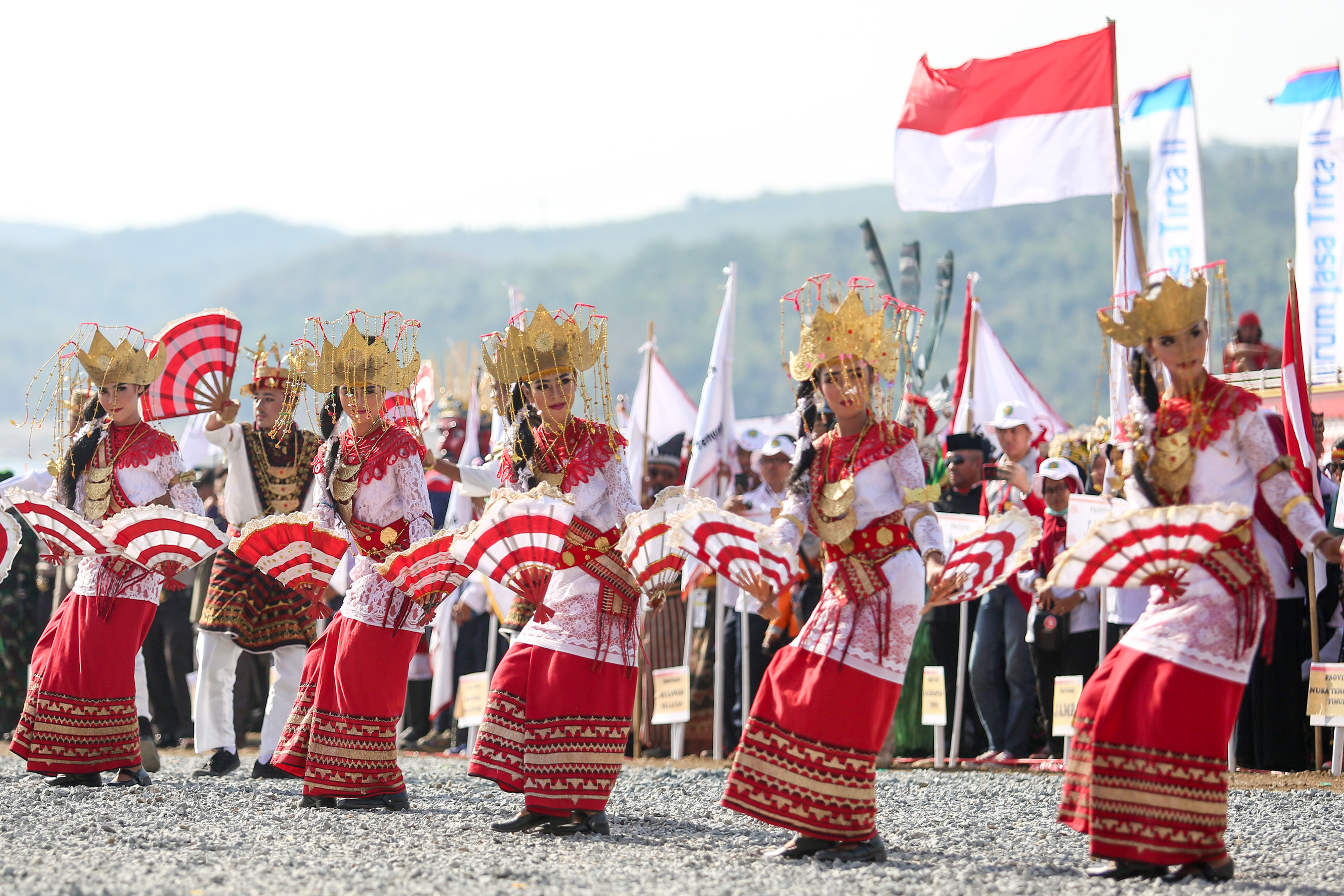 Tari Melinting yang berasal dari Lampung saat pembukaan Temu Karya PMI di Purwakarta (17/09)